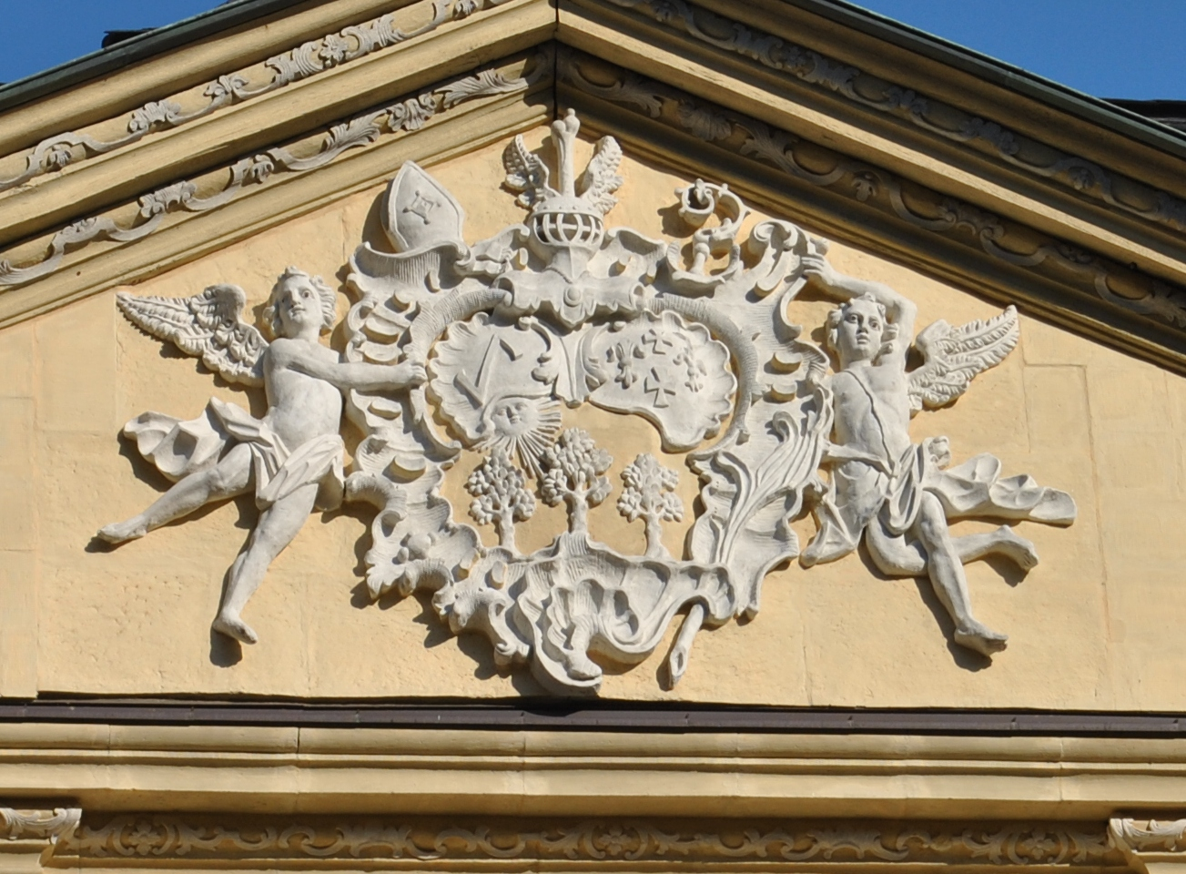 Konvent- bzw. Prälaturgebäude, vierflügelige Anlage um Binnenhof mit verlängertem Ostflügel (ursprünglich als Doppelhofanlage geplant), in Form von dreigeschossigen Flügeln mit Mansarddächern, West- und Südflügel mit Eck- und Mittelrisaliten sowie Pavillondächern, von Balthasar und Franz Ignaz Michael Neumann, Wappen Abt Oswald Loschert 1744-60 D-6-79-209-55